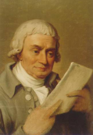 Christian Gottlob Heyne (1729-1812), deutscher Altertumswissenschaftler. Gemälde von Johann Heinrich Wilhelm Tischbein, Öl auf Leinwand. Heute im Besitz der Landesbibliothek Eutin.